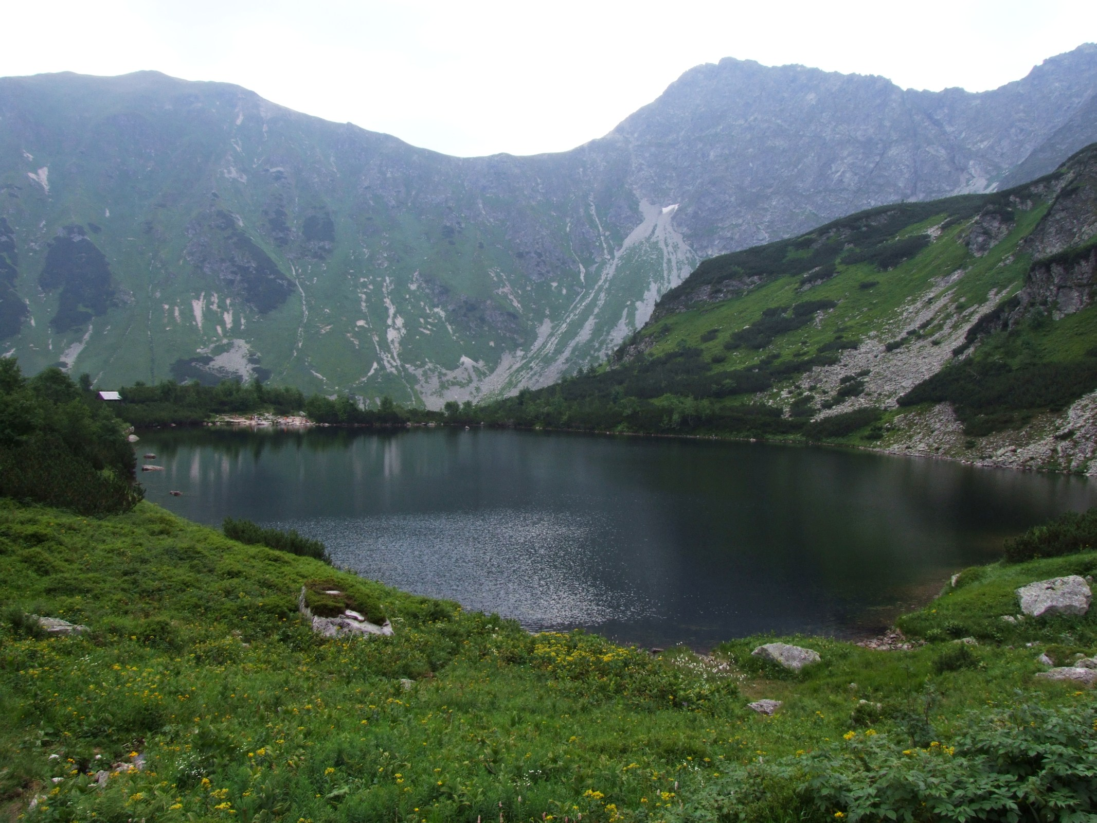 Niżni Staw Rohacki (Stawy Rohackie (Roháčske plesá) - West Tatra Mountains)